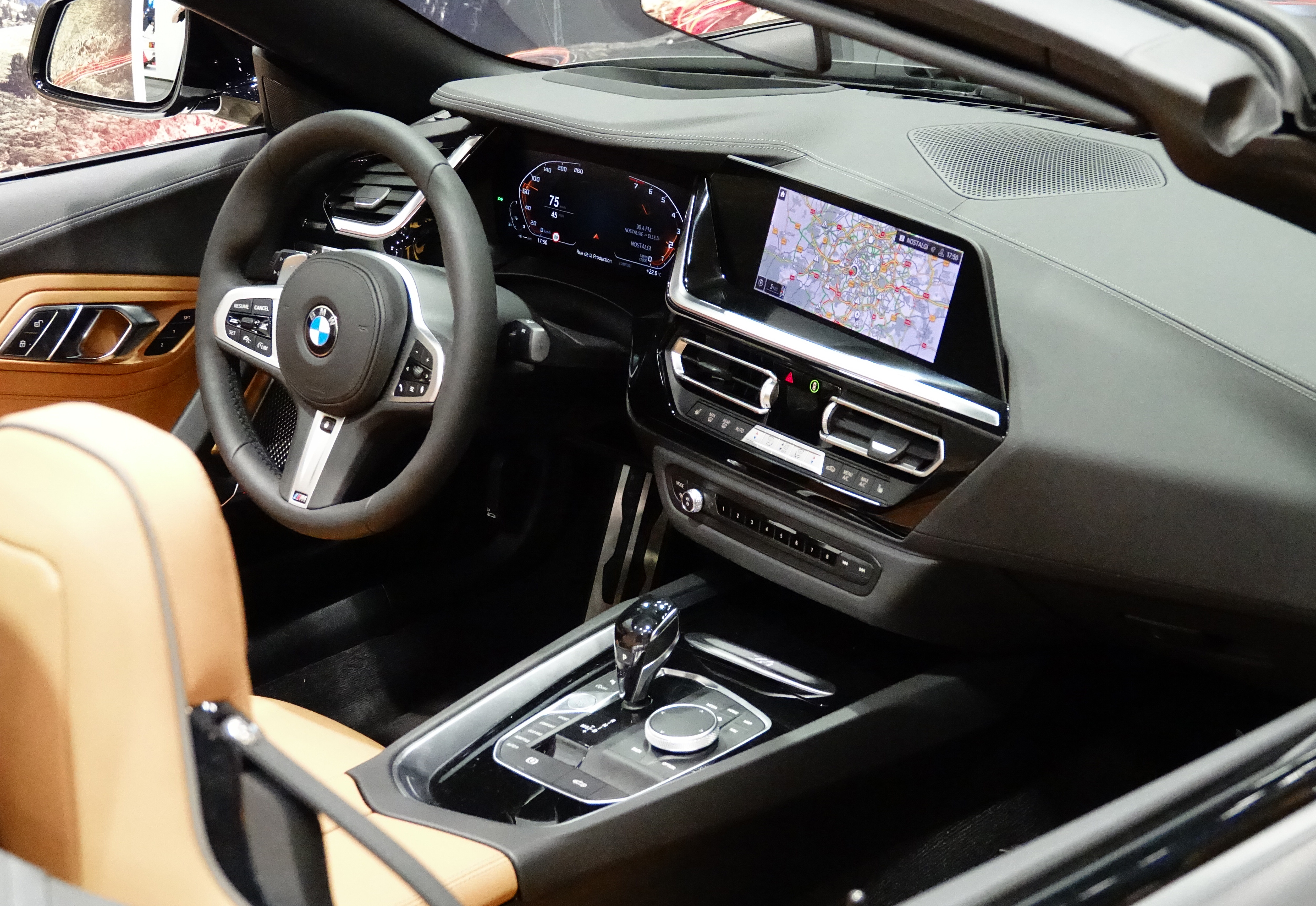 BMW Z4 III à Rétromobile 2019